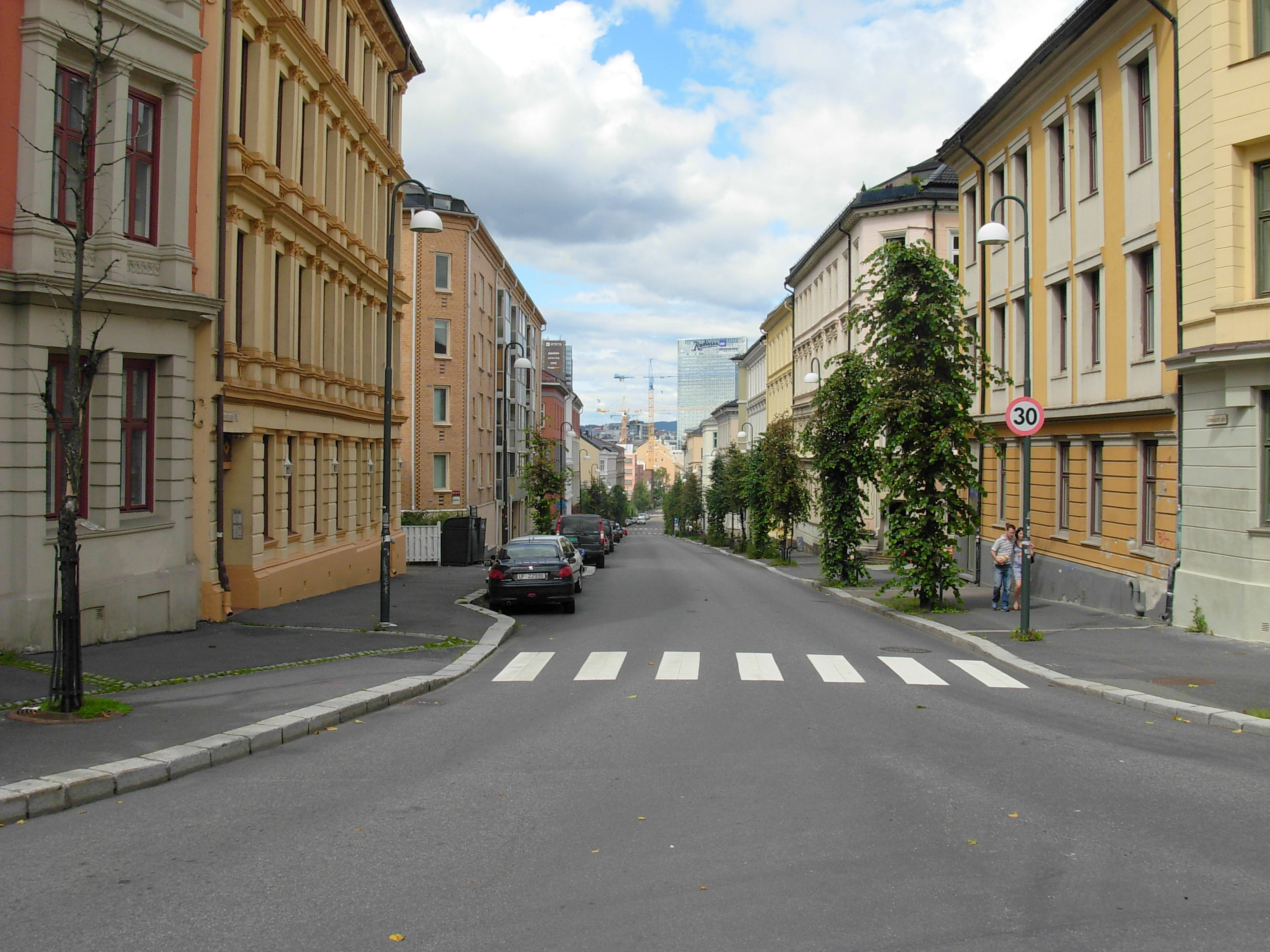 Schweigaards gate, sett vestover fra Harald Hårdrådes plass